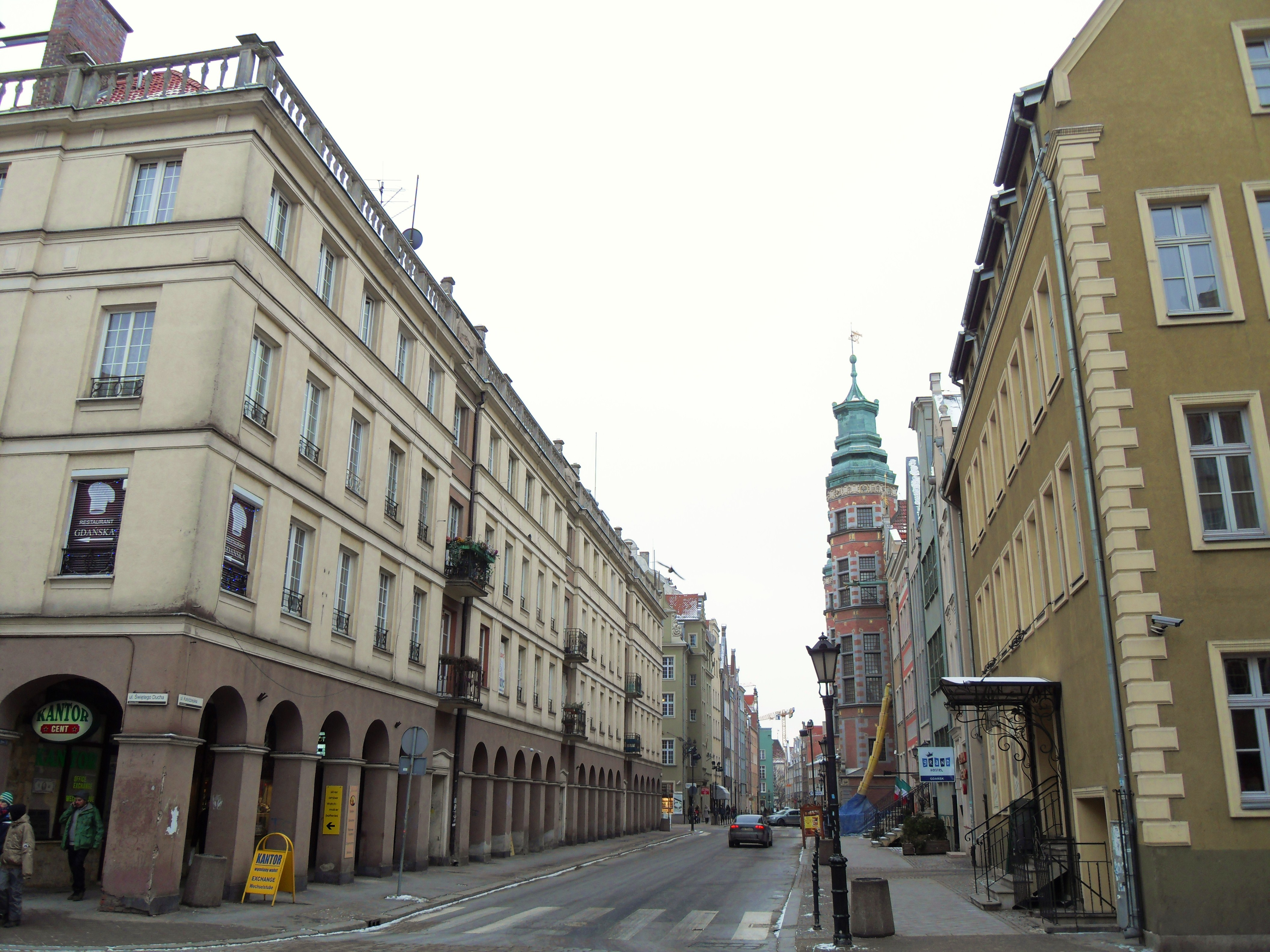 Gdańsk Główne Miasto, ul. Kołodziejska.